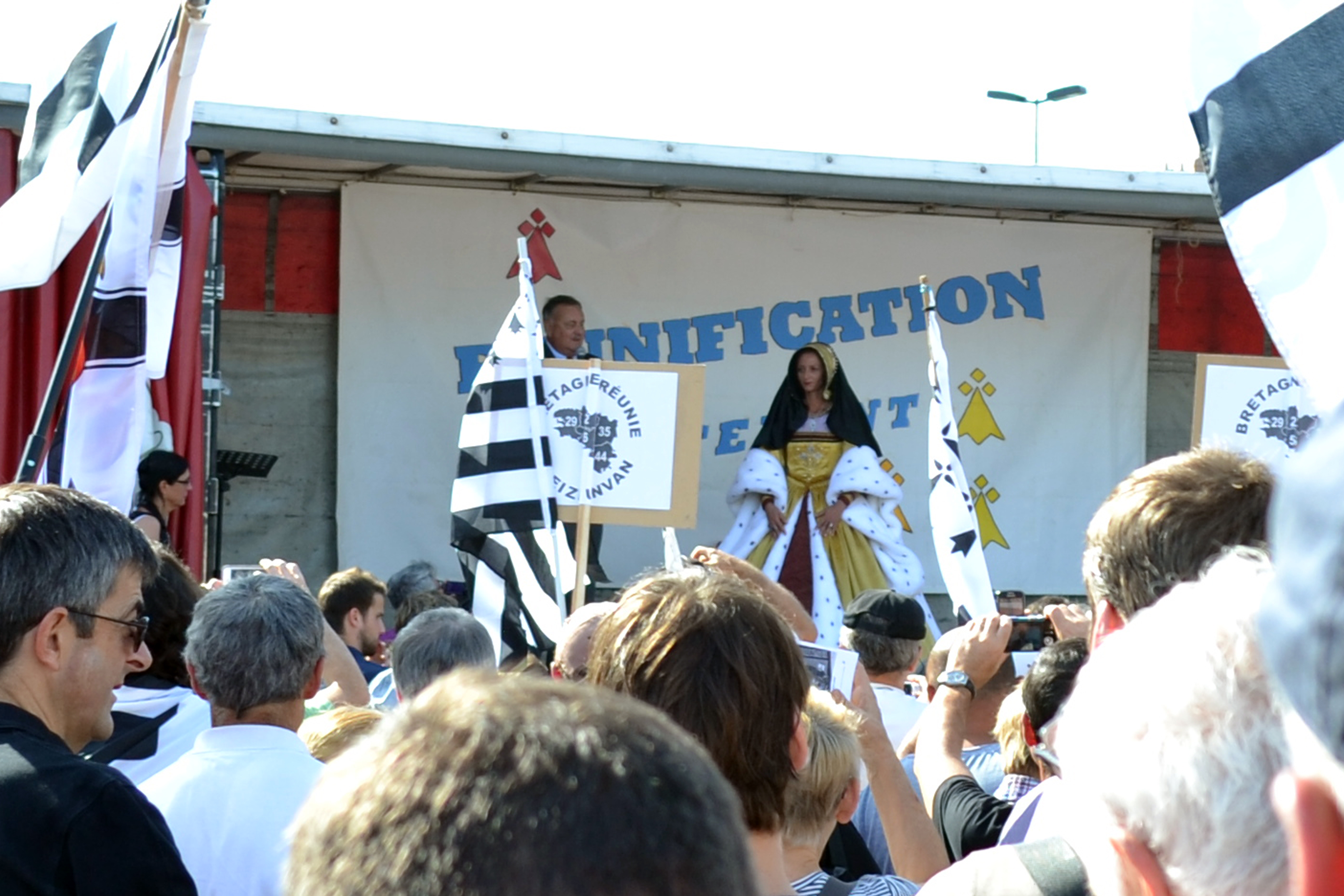 Des milliers de drapeaux bretons brandis à Nantes le 27 septembre 2014 pour célébrer la Bretagne entière et son projet d'avenir commun. La 3e grande manifestation populaire de l'année revendiquait une cohérence territoriale, économique, culturelle, pour que la péninsule plus que millénaire conserve son unité.